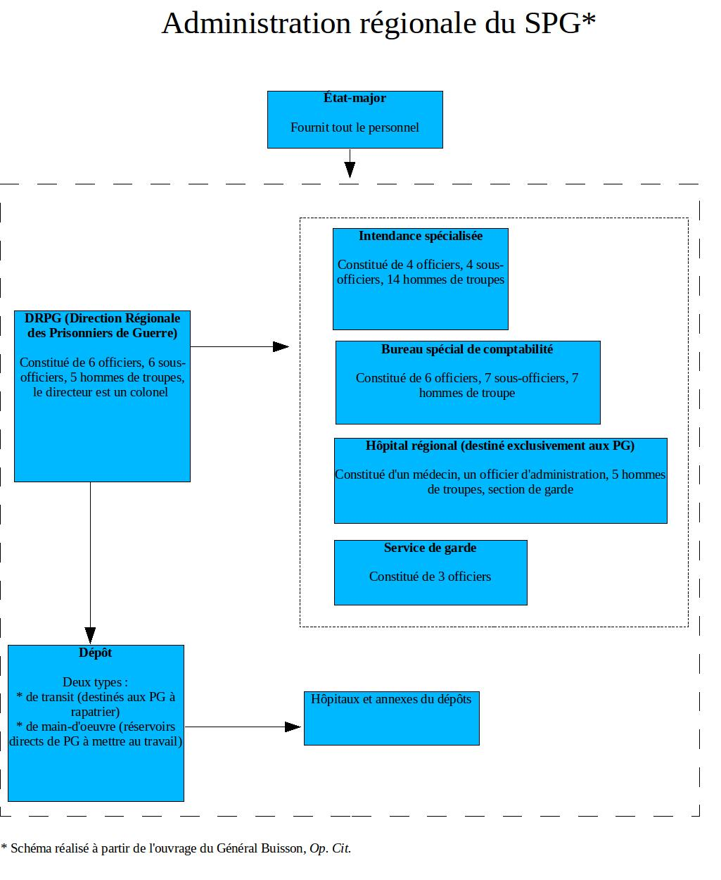 Source : Général Buisson, Historique du service des prisonniers de guerre de l’Axe, 1943-1948, Paris, ministère de la Défense nationale, 1948